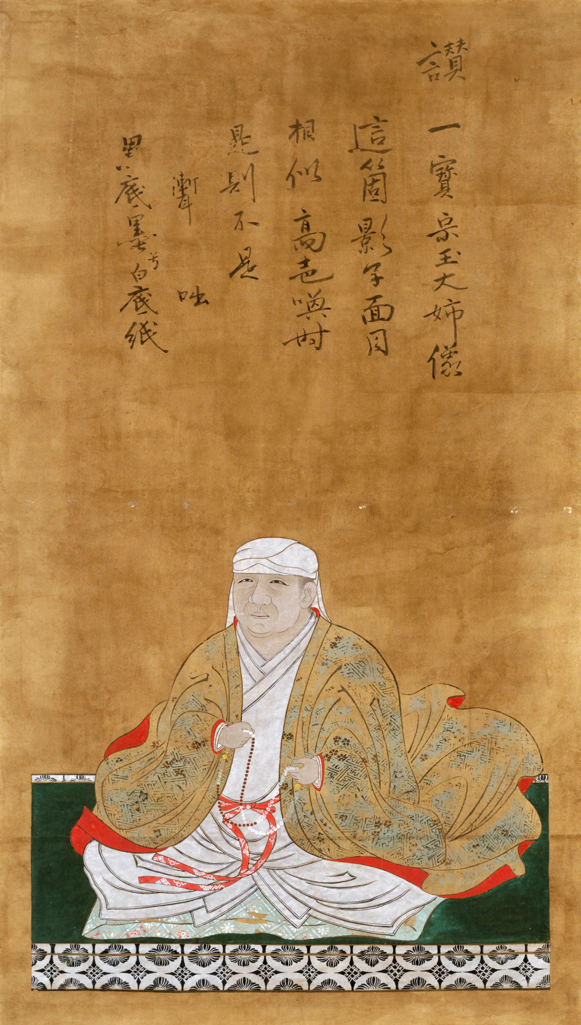 一寳宗玉大姉像、浅野長政室（長生院） 模写。原本は侯爵浅野長勲氏所蔵。（79,5×45,0cm）